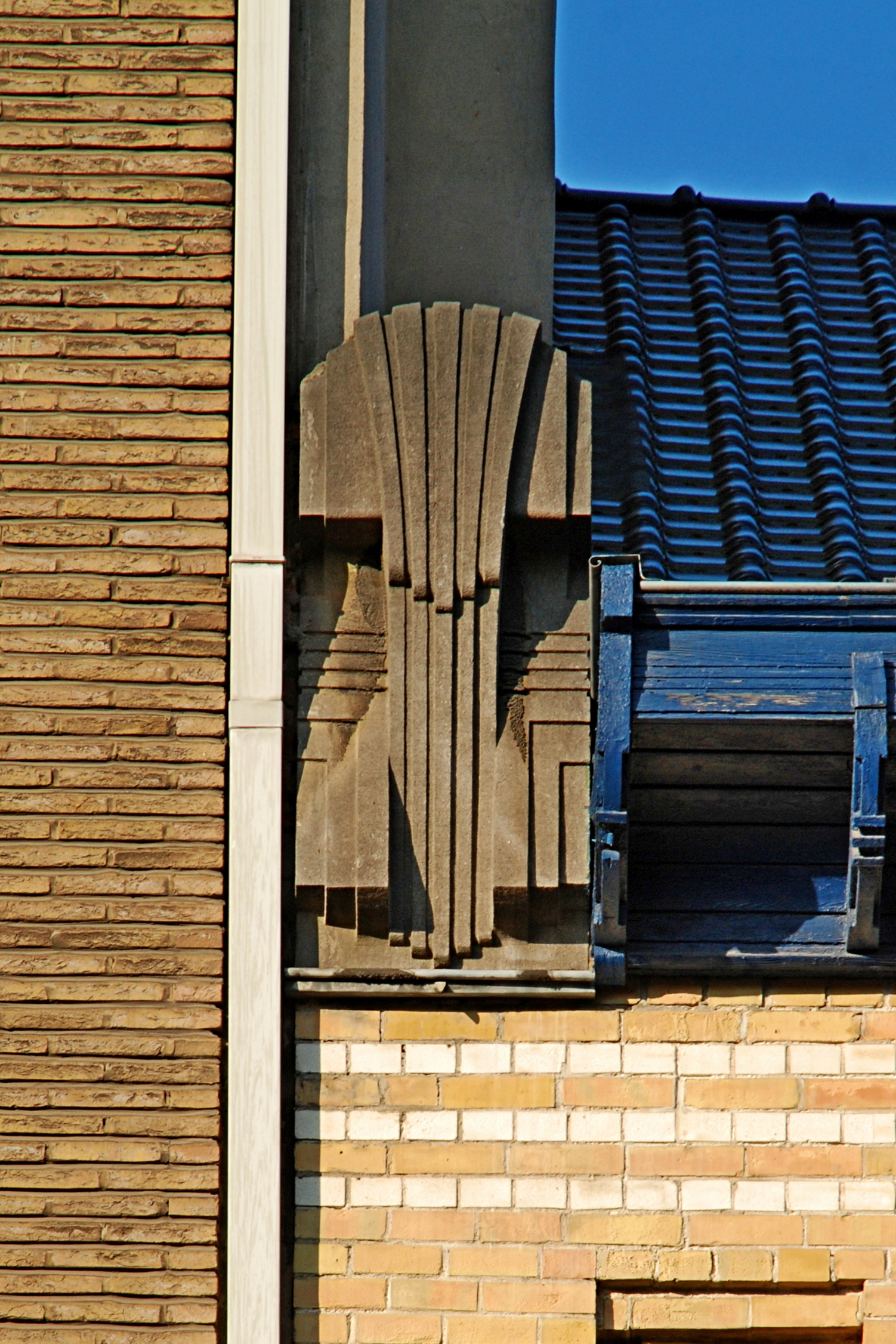 Belgique - Bruxelles - Maison-atelier du peintre Paul Verdussen (Art nouveau géométrique, architecte Paul Hamesse, 1901)